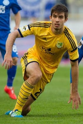 Ігор Харатін - футболіст Металіста